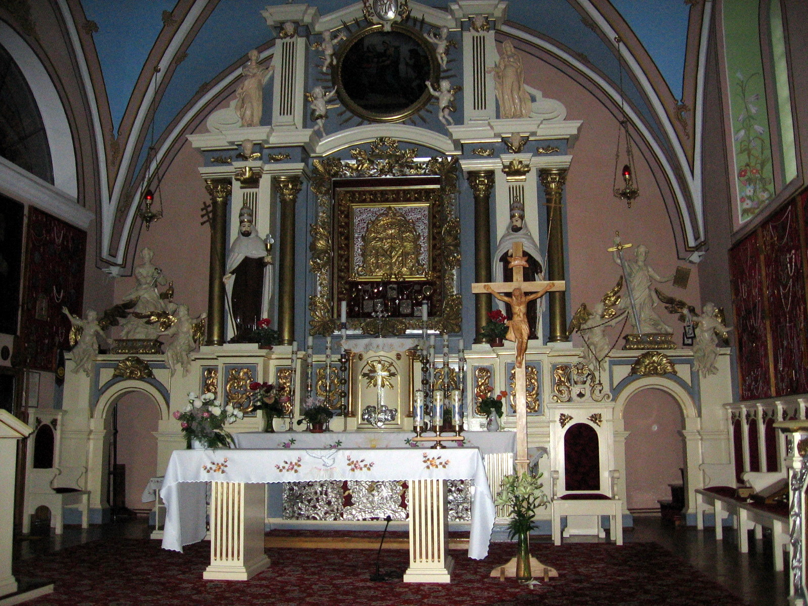 zespół klasztorny karmelitów: kościół, ob. par. pw. Nawiedzenia NMP, 1627-49; klasztor, 1741-53 Obory, Gmina Zbójno